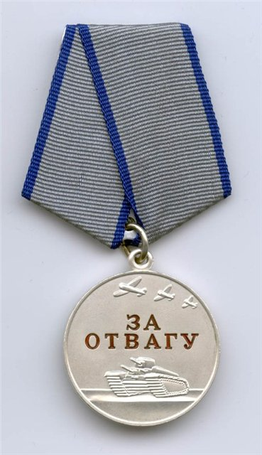 медаль За Відвагу